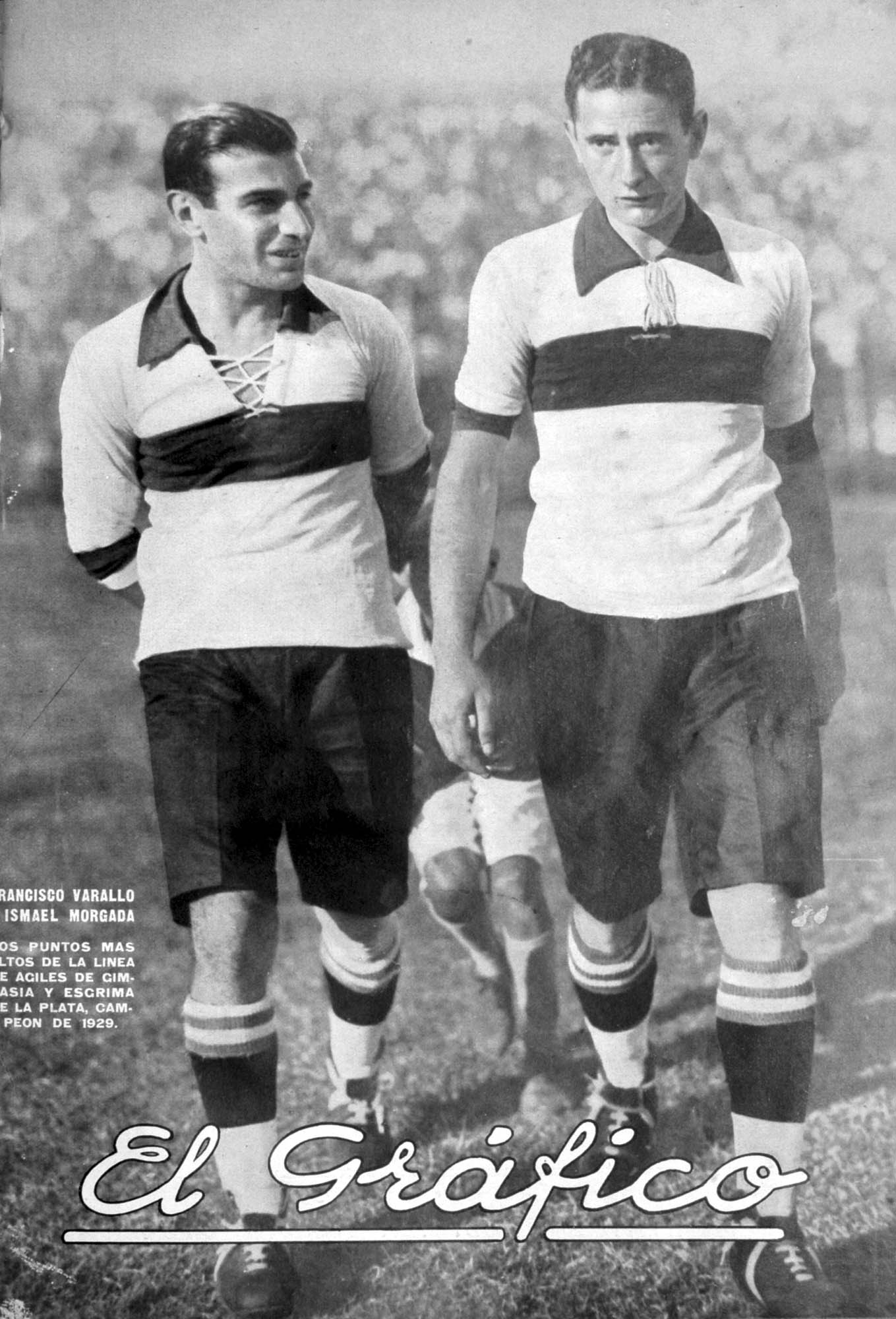 El Grafico del 15 de Febrero de 1930. Edicion 553